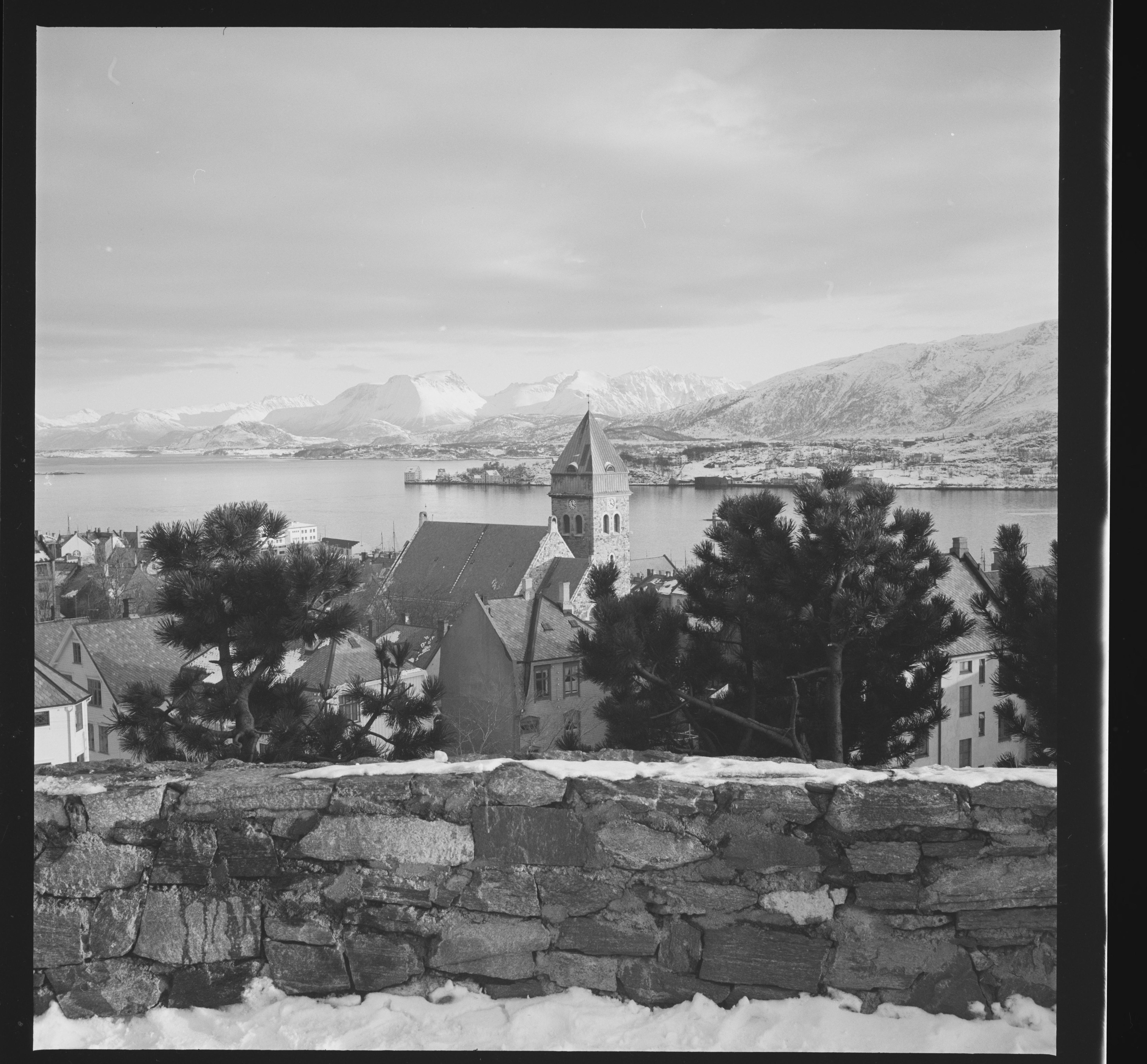 Bildet er hentet fra Nasjonalbibliotekets bildesamling Ålesund, Ålesund, Møre og Romsdal